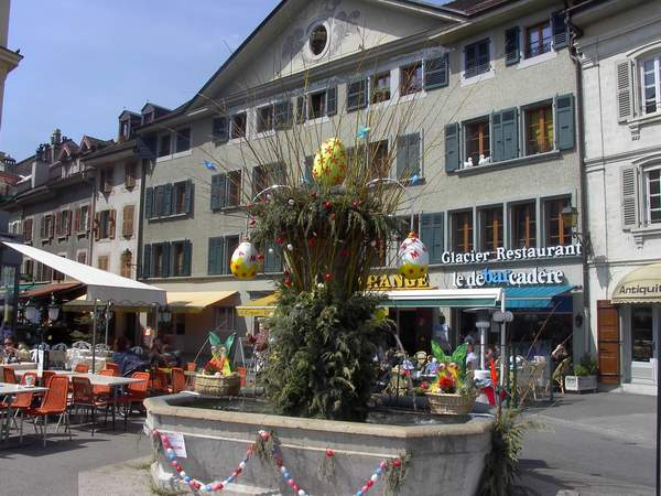 An Ostern werden in Nyon die Brunnen mit Oster-Symbolen geschmückt